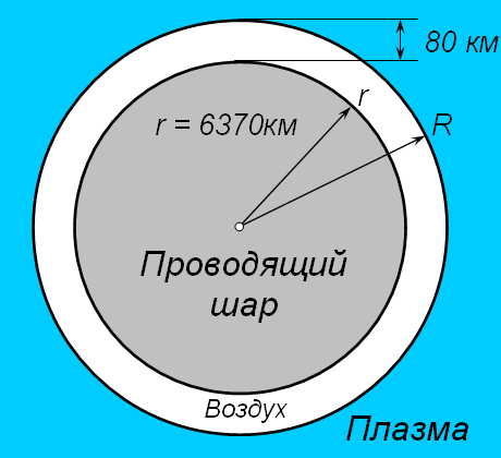 Простейшая модель резонатора «поверхность земли-ионосфера»